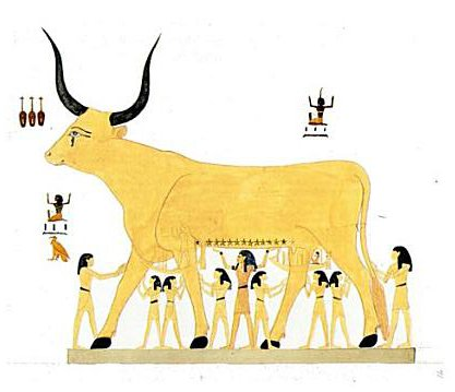 Die Himmelskuh im Grab von Sethos I., Aquarell von Robert Hay (nach 1825), nun im Besitz der British Library